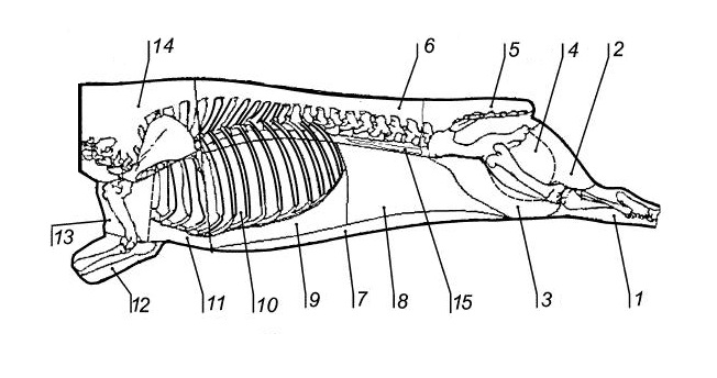 1, 12. զինգ; 2-5. կոնքազդրային կտոր; 6. գավակ և սուկի; 7-8. փորամիս; 9, 11, 13. երբուծ; 10. կողաճաղեր; 14. վիզ